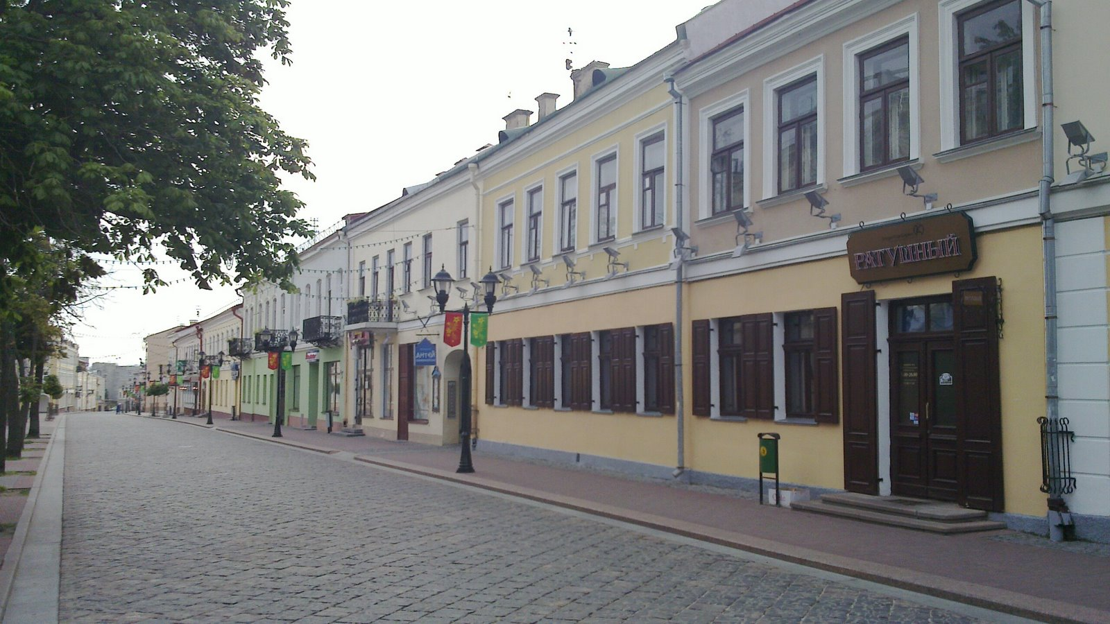 Улица Советская